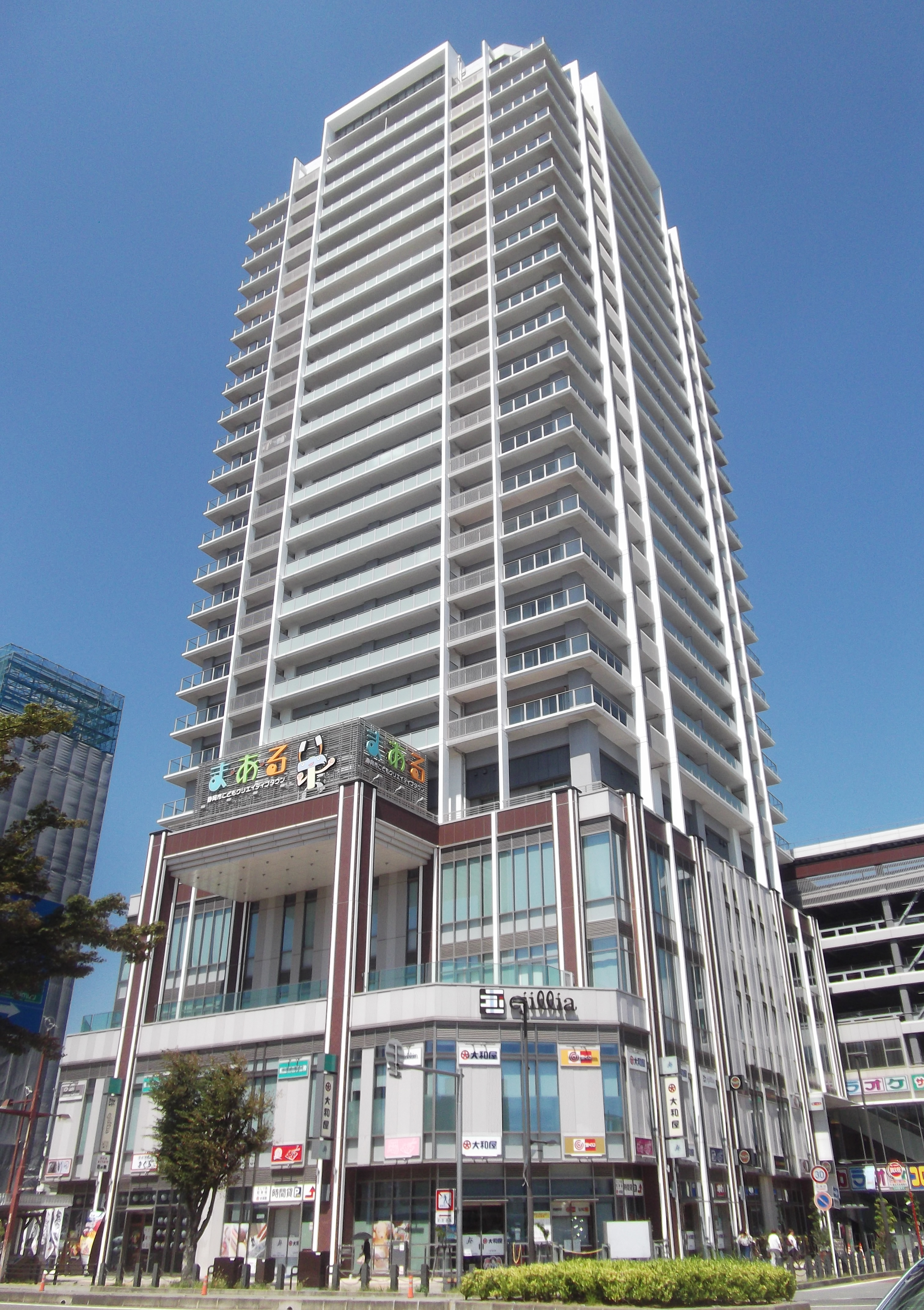 マークス・ザ・タワー清水(えじりあ)。